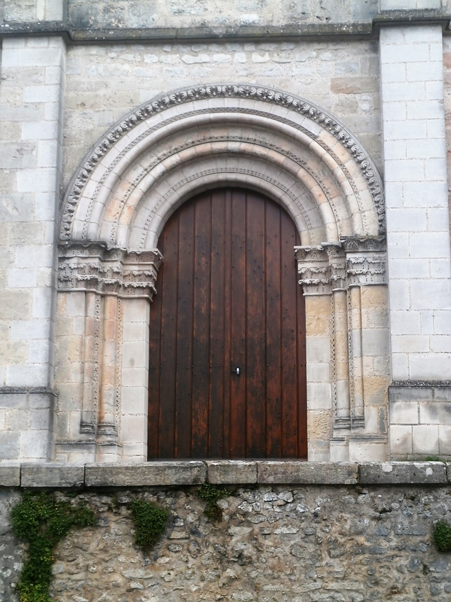 Portail ouest roman de l'église Saint-Vincent d'Orbigny